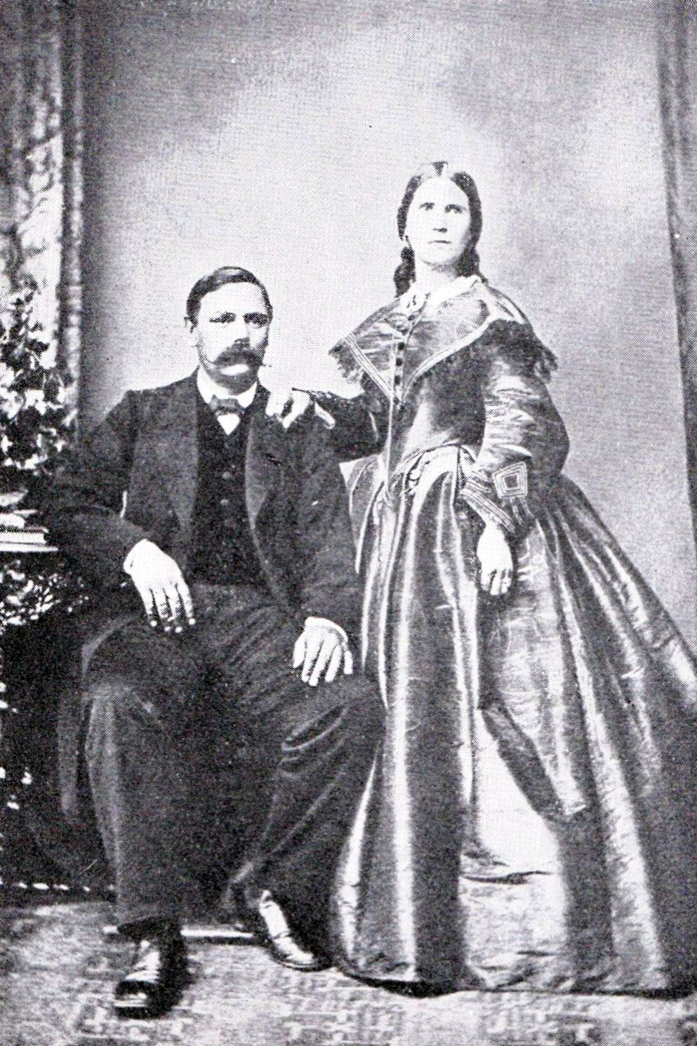 Maria Grigorescu (căsătorită Ghigorț) împreună cu soțui ei. (foto)